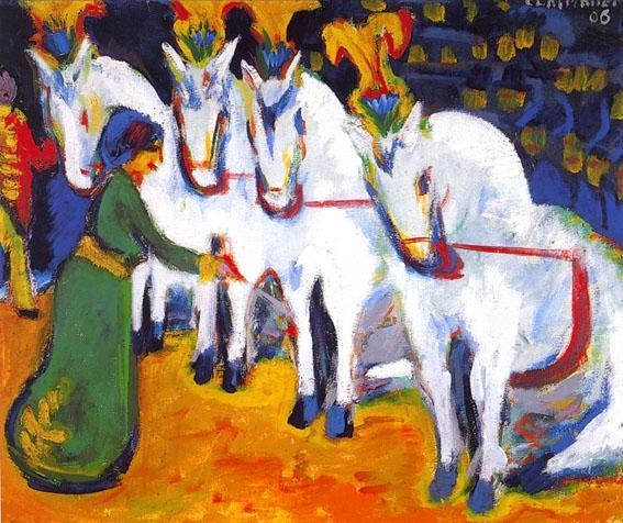 Ernst Ludwig Kirchner: Schimmeldressurakt , 1908/09, Öl auf Leinwand, Kirchner Museum Davos